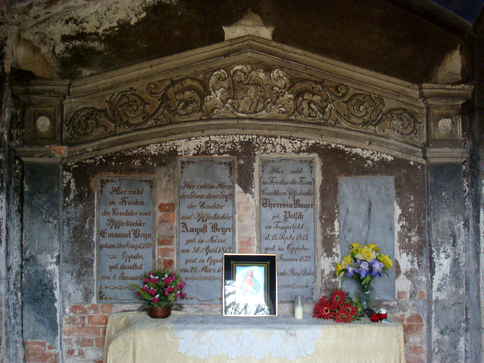 Wnętrze kaplicy cmentarnej rodziny Beyer na cmentarzu ewangelicko-augsburskim przy ul. Wrocławskiej w Opolu